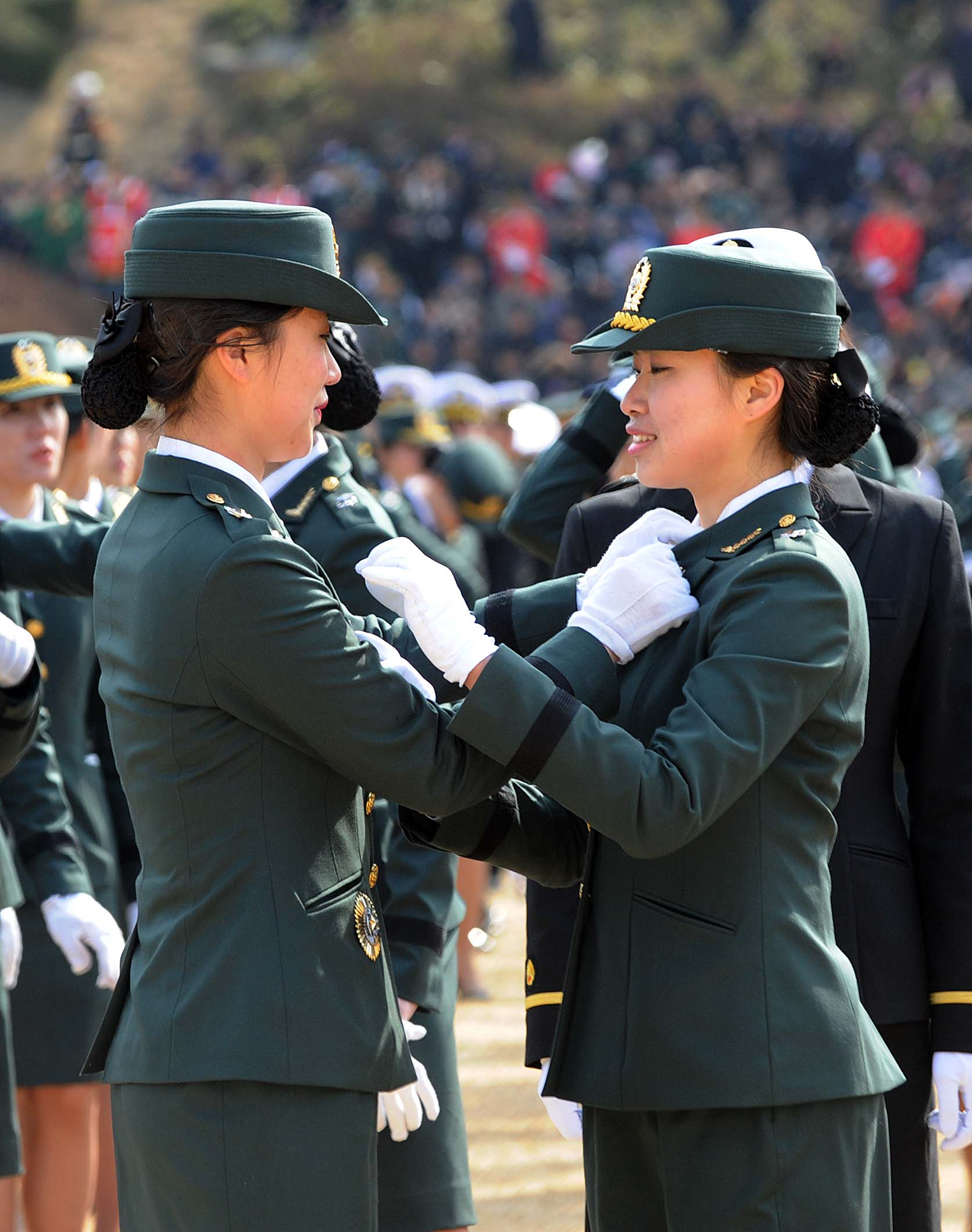 14. 3. 6 계룡대에서 실시된 2014 합동임관식 사진입니다. 이날 5,860명이 신임 소위가 임관하였습니다.